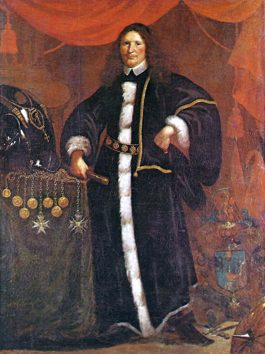 Cort Sivertsen Adeler var en norsk/dansk admiral, født 16. december 1622 i Brevik i Norge, død 5. november 1675.